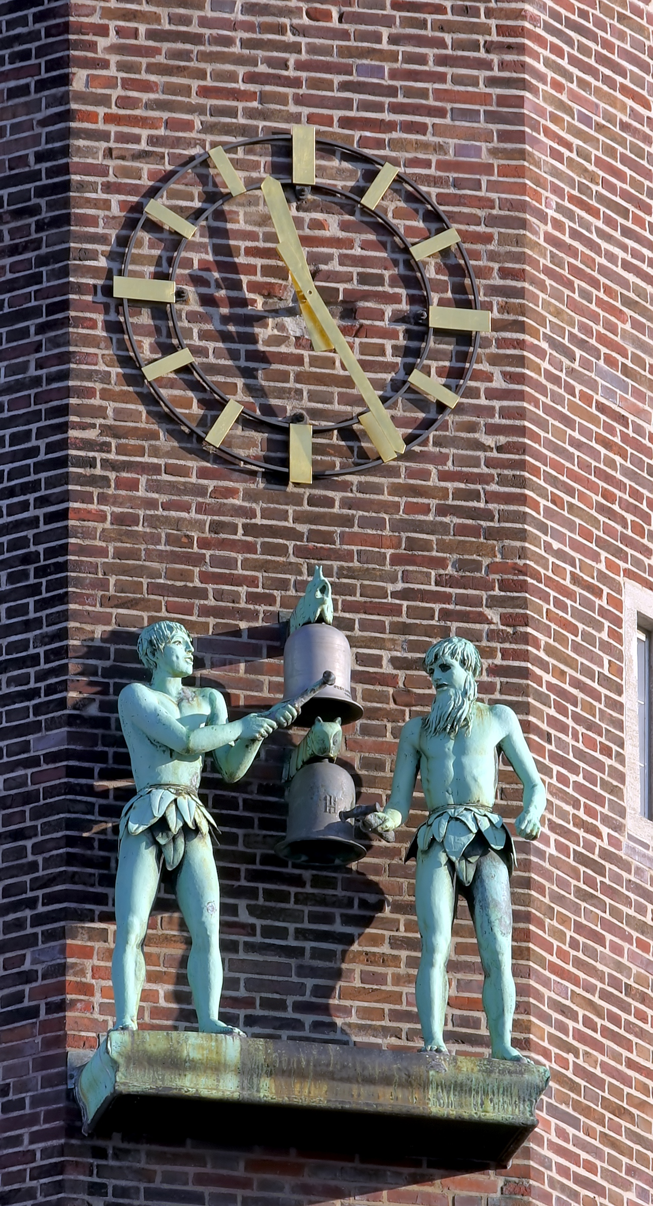 Haus Neuerburg, Köln. Turmuhr (Uhrzeit: 11:35) und Figuren am Treppenturm. Architekt: Emil Felix, Baujahr: 1923-29.